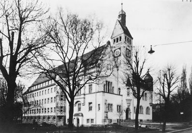 Rathaus Siegmar-Schönau nach der Erweiterung, 1937.